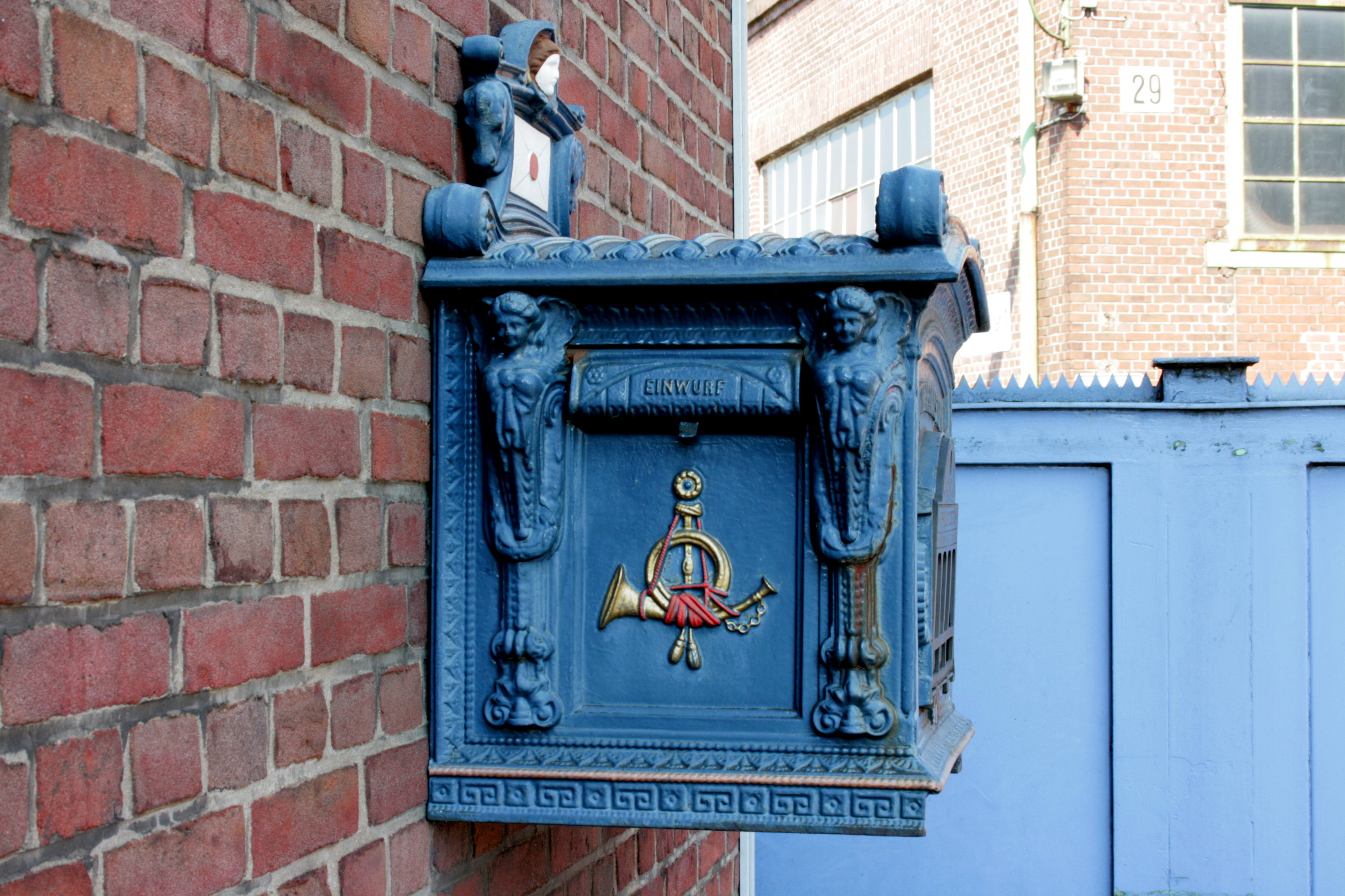 Isselburger Hütte (Isselburg Guss und Bearbeitung GmbH) in Isselburg